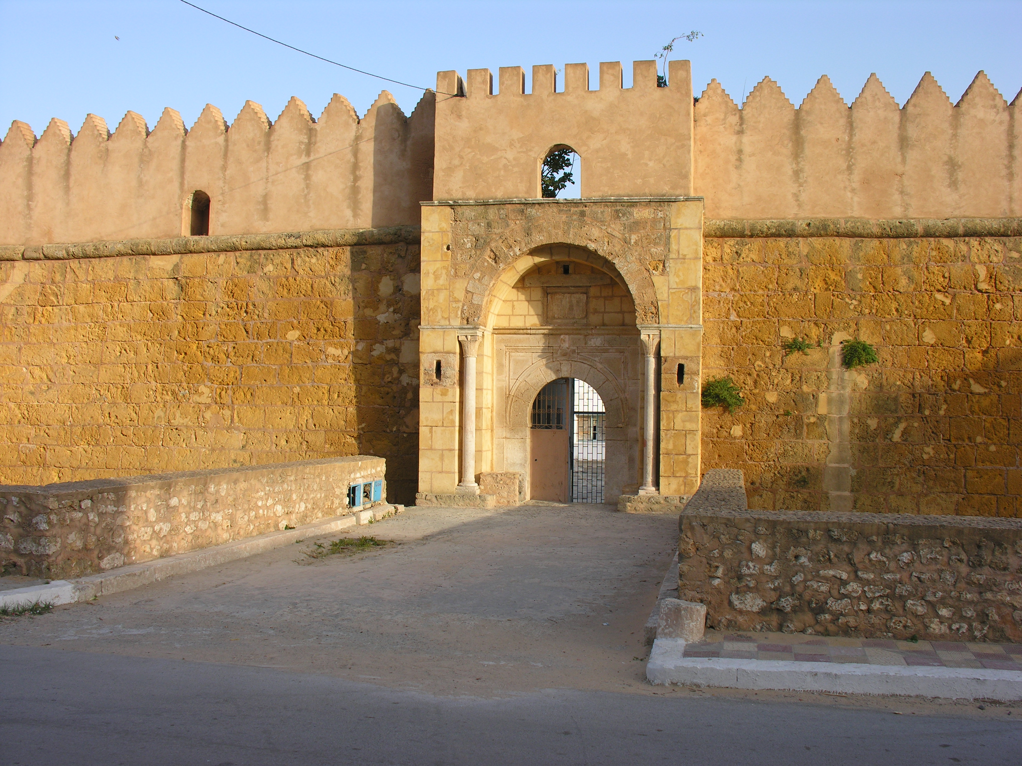 Borj El Woustani (Ghar El Melh)